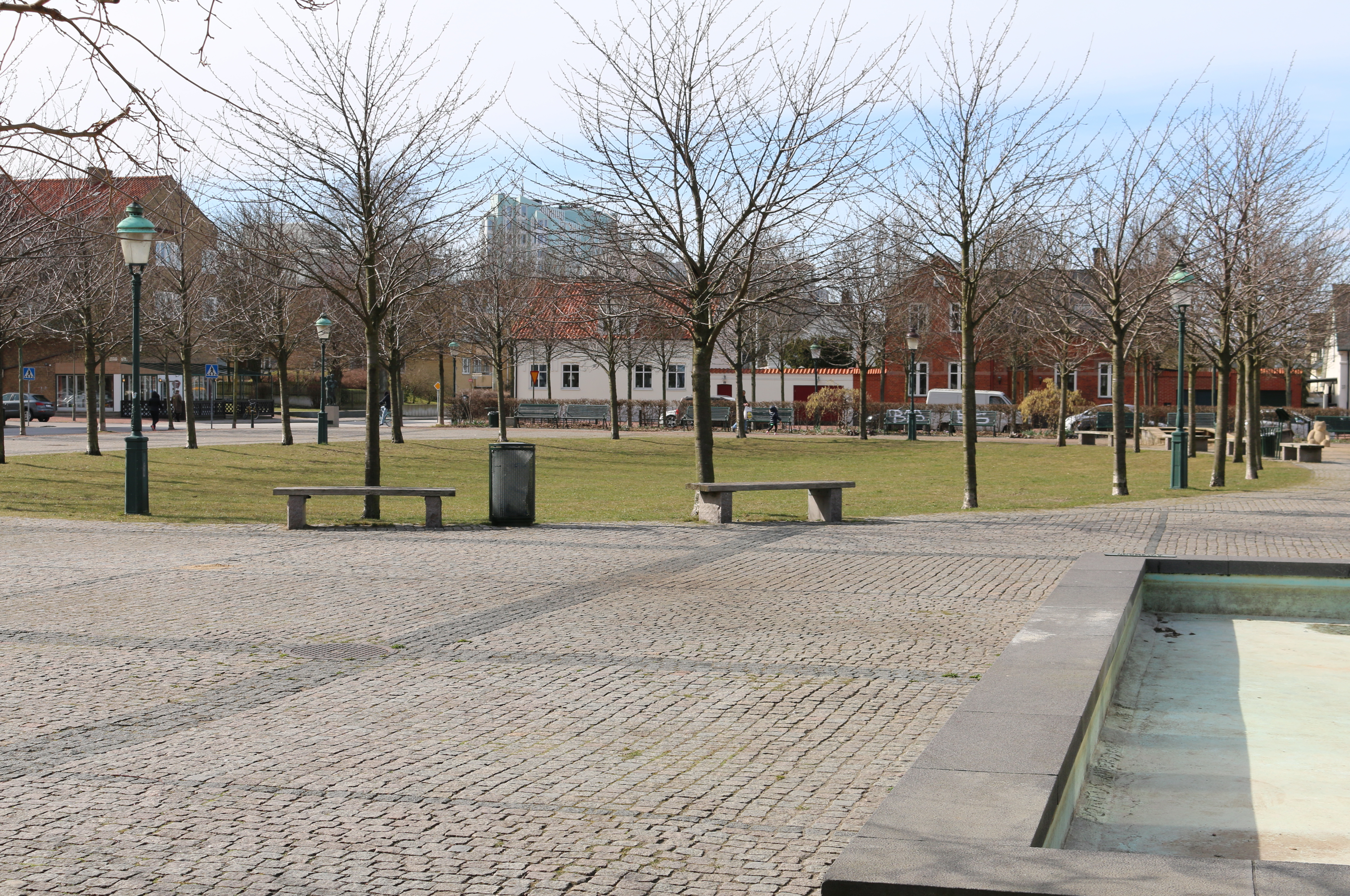 Limhamns torg i mars 2015